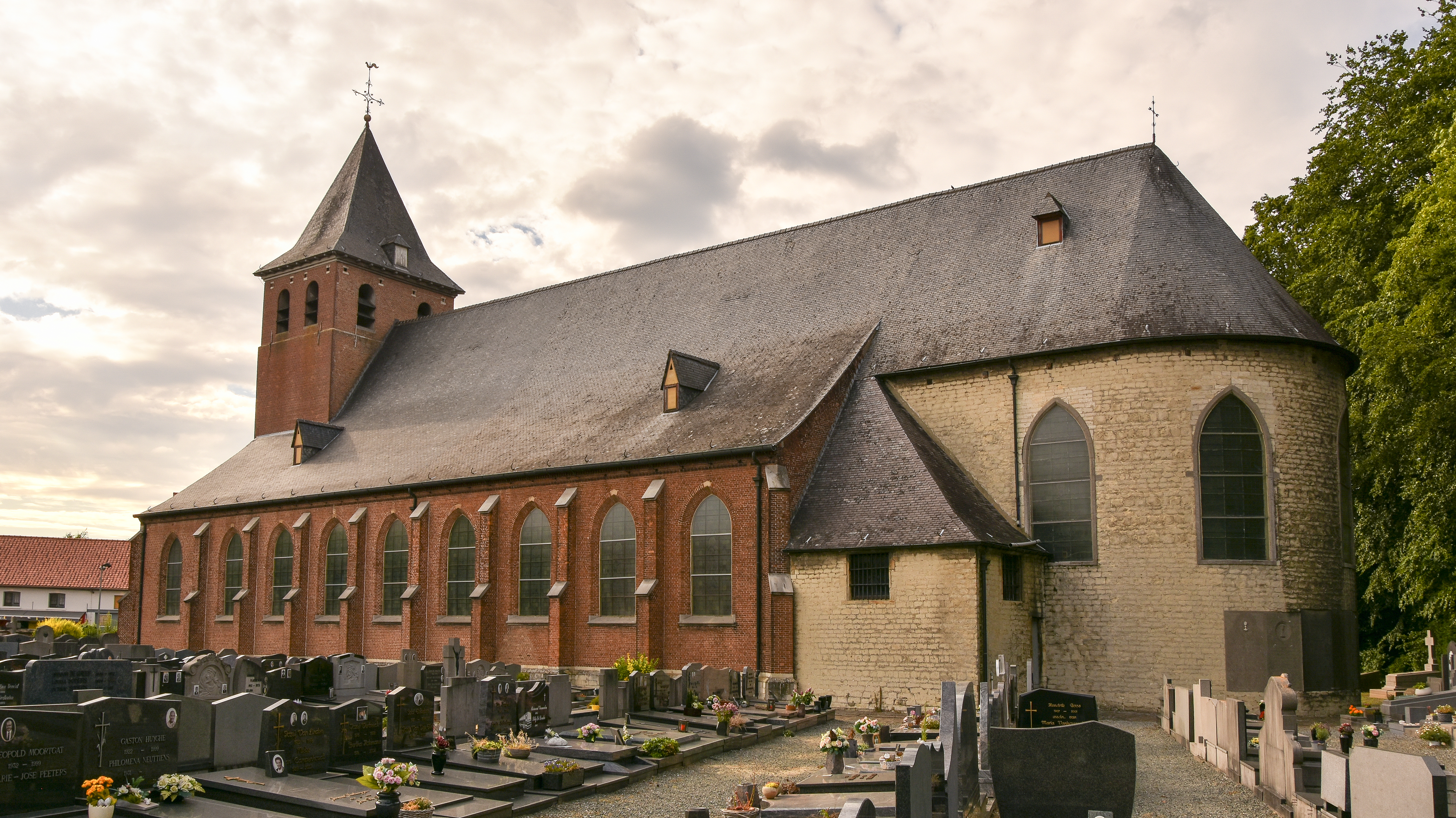 Sint-Niklaaskerk (Leest) 16-06-2018